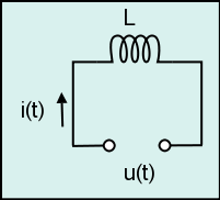 Inductancia